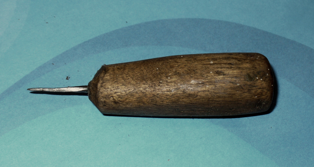 Шило с деревянной ручкой